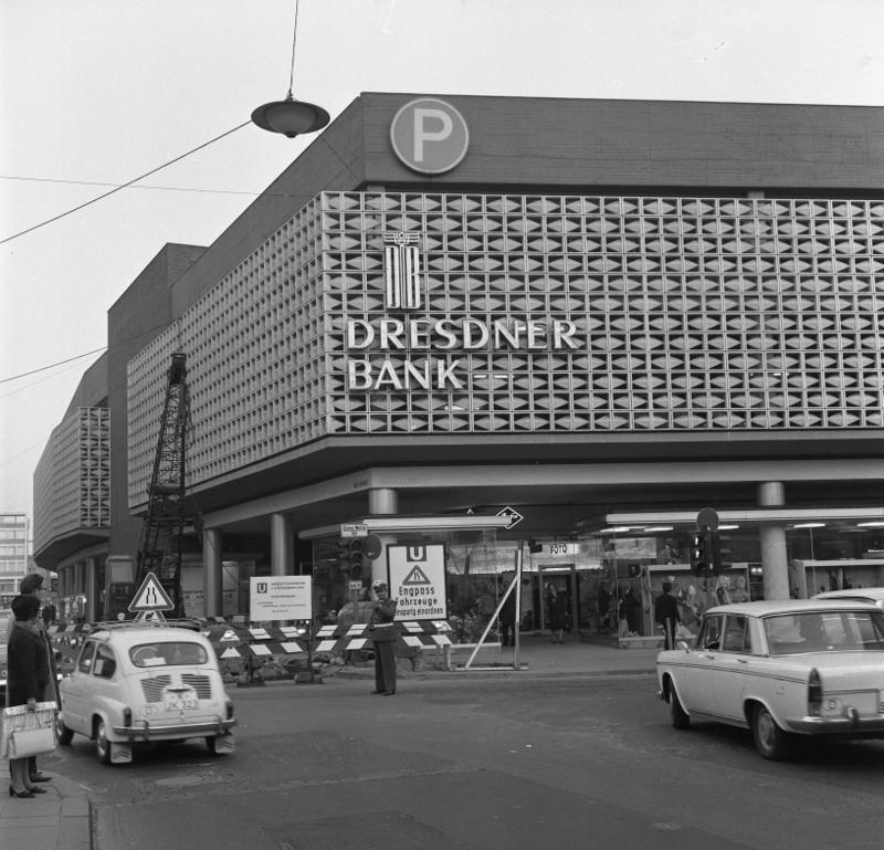 Einkaufszentrum "Schweizer Ladenstraße" in Opernhaus-Nähe Information added by Wikimedia users.